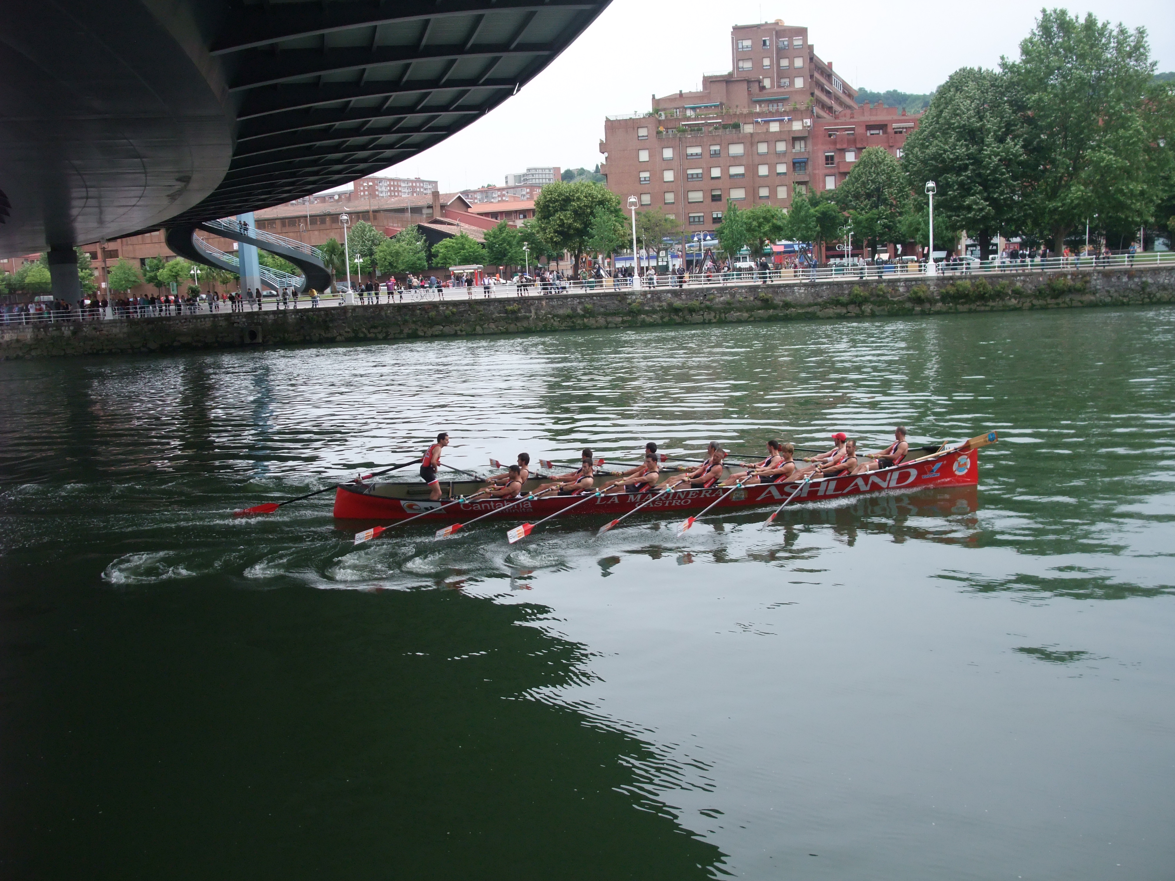 Bilbao (Vizcaya)-Bandera de Bilbao de traineras 2012-1-Castro